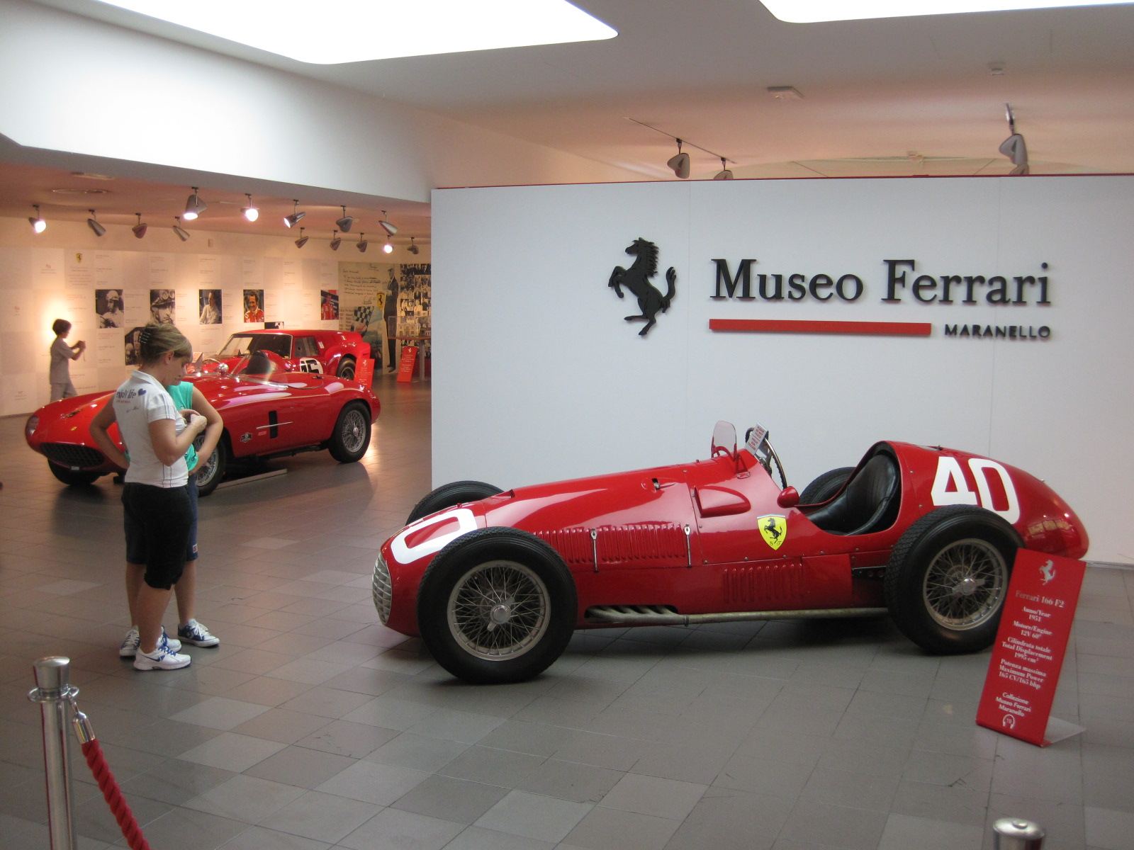 Galleria Ferrari